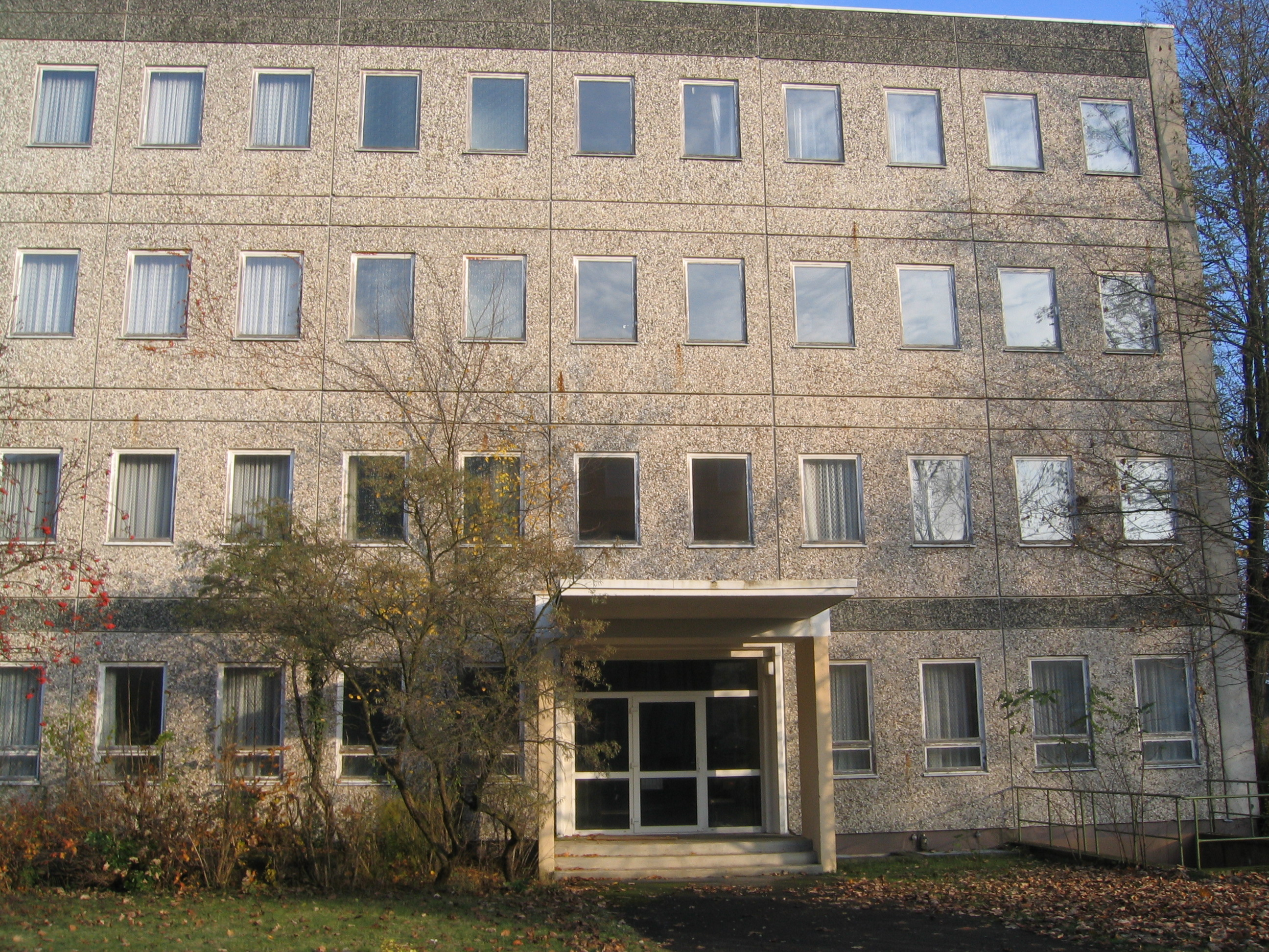 MfS Hauptverwaltung Aufklärung, Schulungsobjekt "Kombinat Gosen"